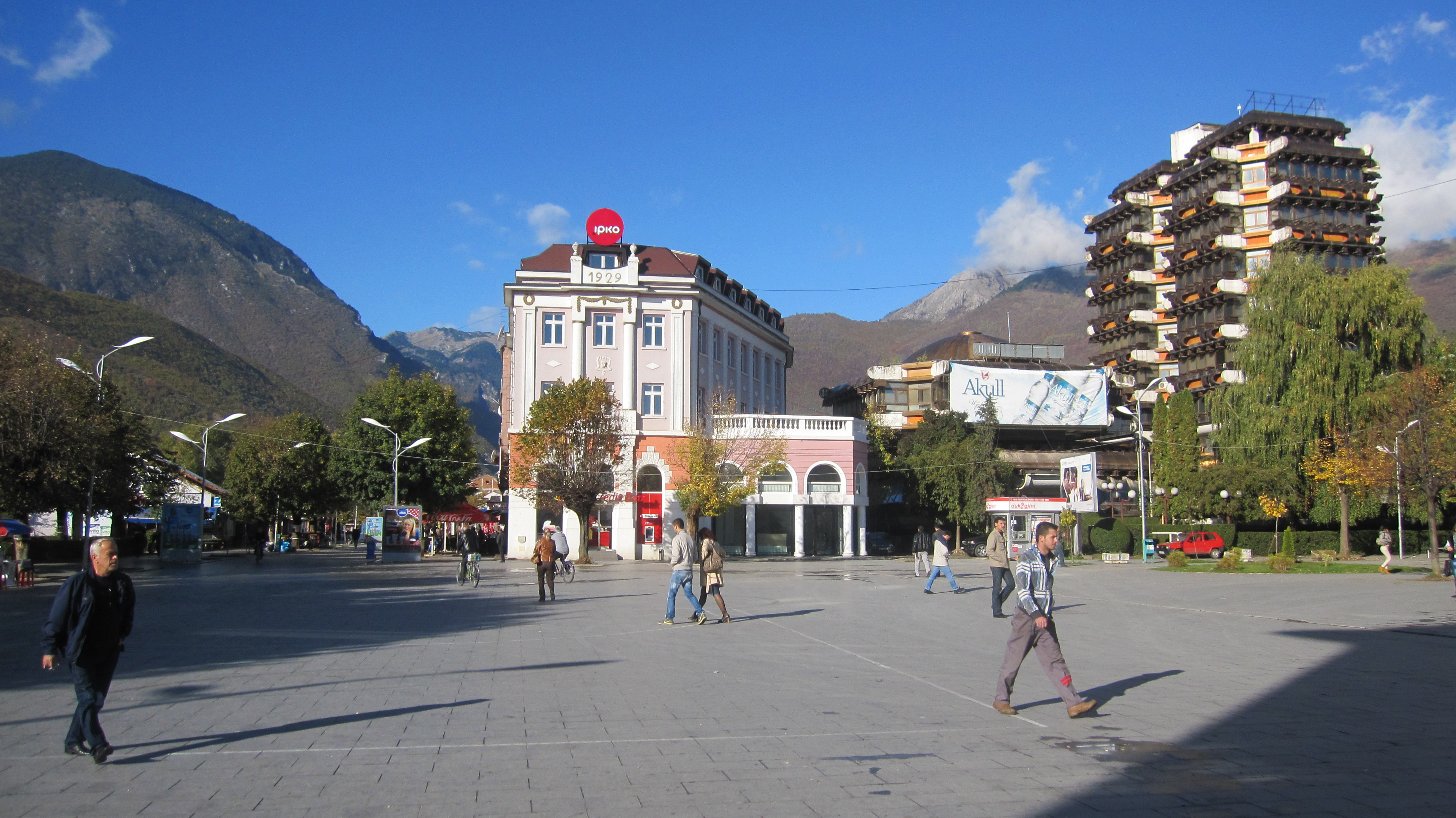 Qendra e Pejes